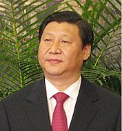 Xi Jinping 习近平